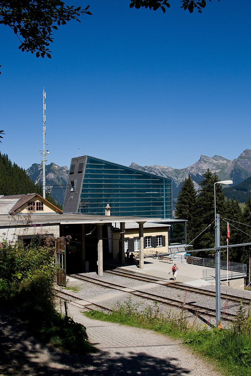 Bahnhof und Bergstation der Mürrenbahn auf der Grütschalp